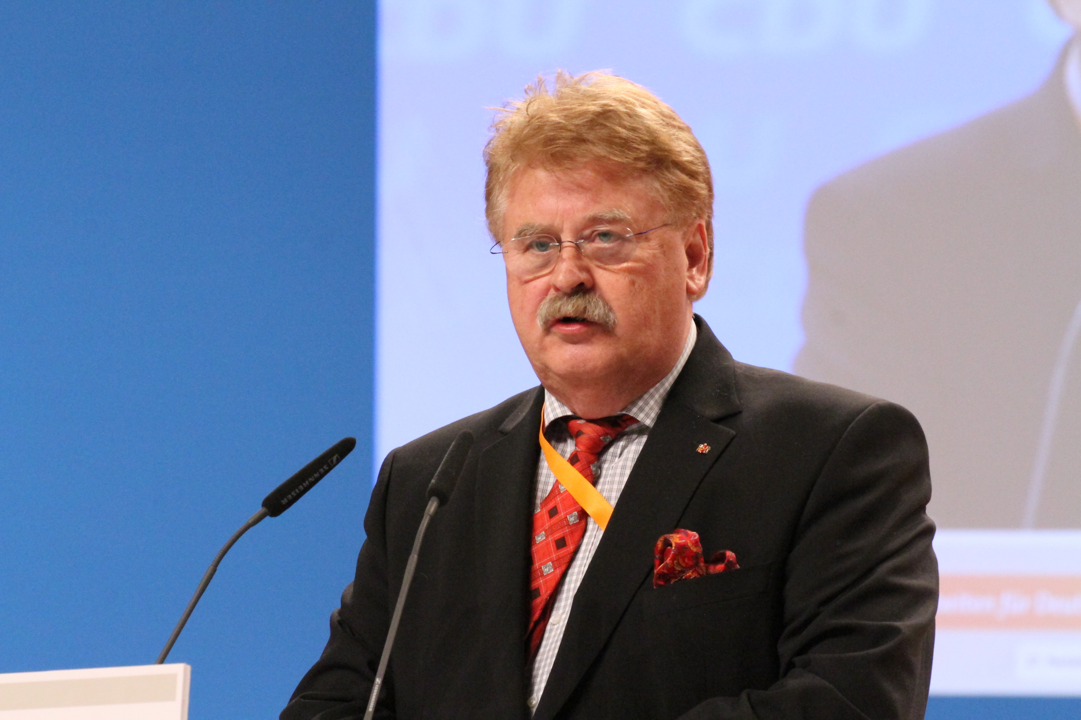 Elmar Brok auf dem CDU Bundesparteitag Dezember 2014 in Köln